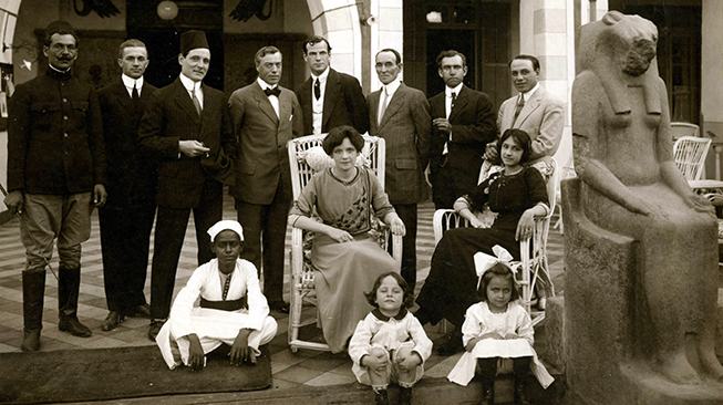 En 1912, une équipe de cinéaste américain de la compagnie Kalem s'installe à Louxor en Égypte.